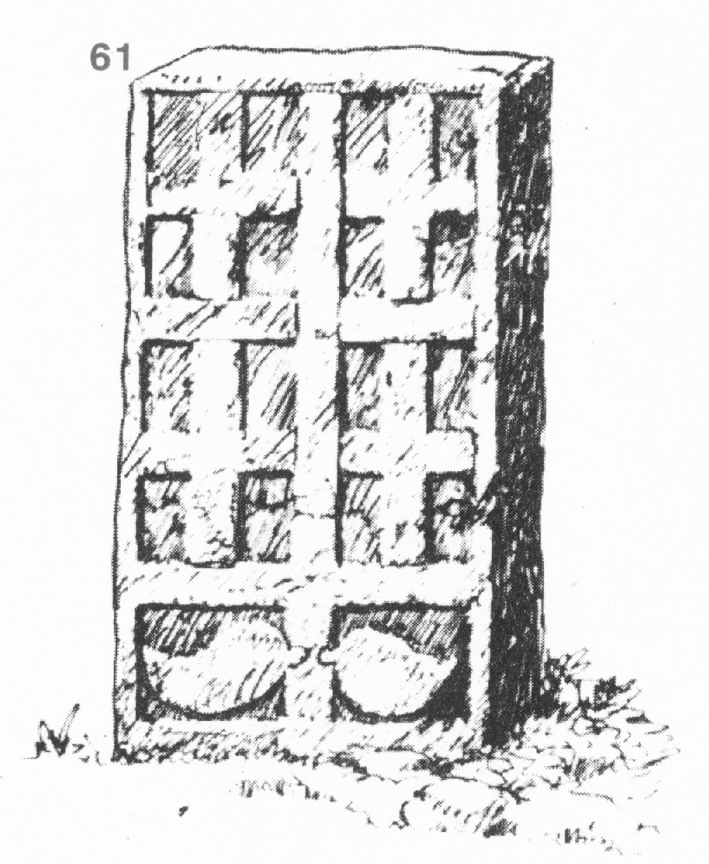 61. Надгробна плоча с кръстове, издялана от сив точилен камък. Лицето и е снишено с 1 см и са образувани 4 четирикрилни кръста, долните и горните крила на които са по-дълги от страничните. Под кръстовете са издялани и един чифт пафти. 30-40-годишна. Размери на плочата: 70x34x11 см. Скицирана в гробищата на гр. Мездра (Врачанско) на. 10.VII.1916 г. (Т. 9, обр. 82.)